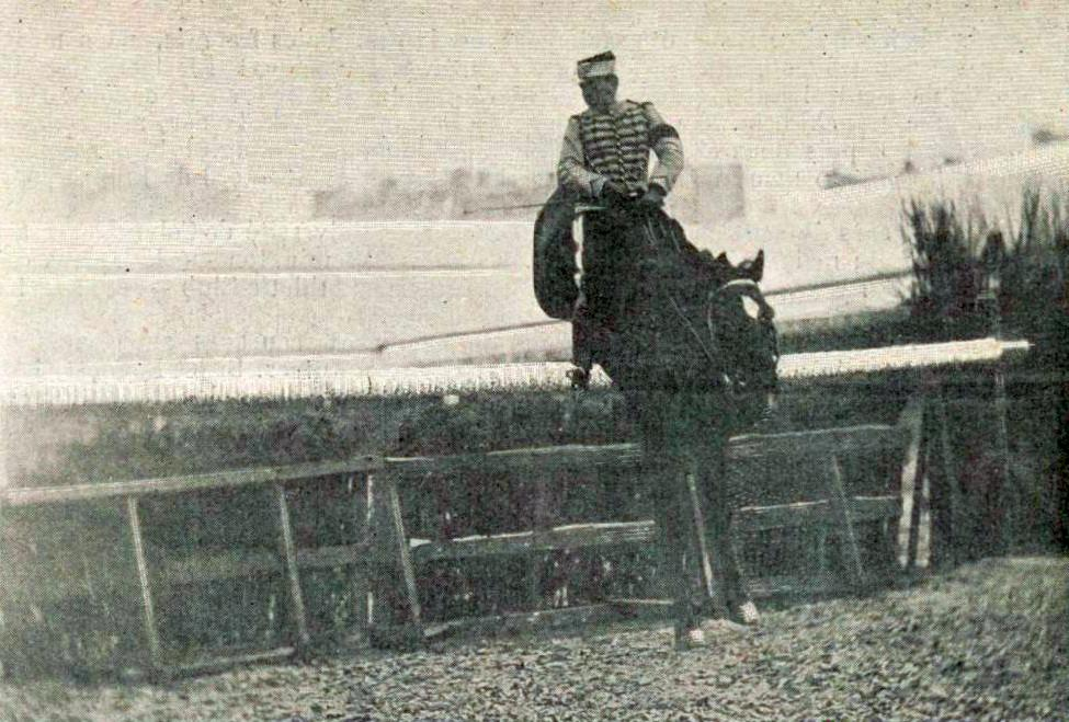 Le Prince Napoléon Murat, sur 'Bayard' (JO 1900).